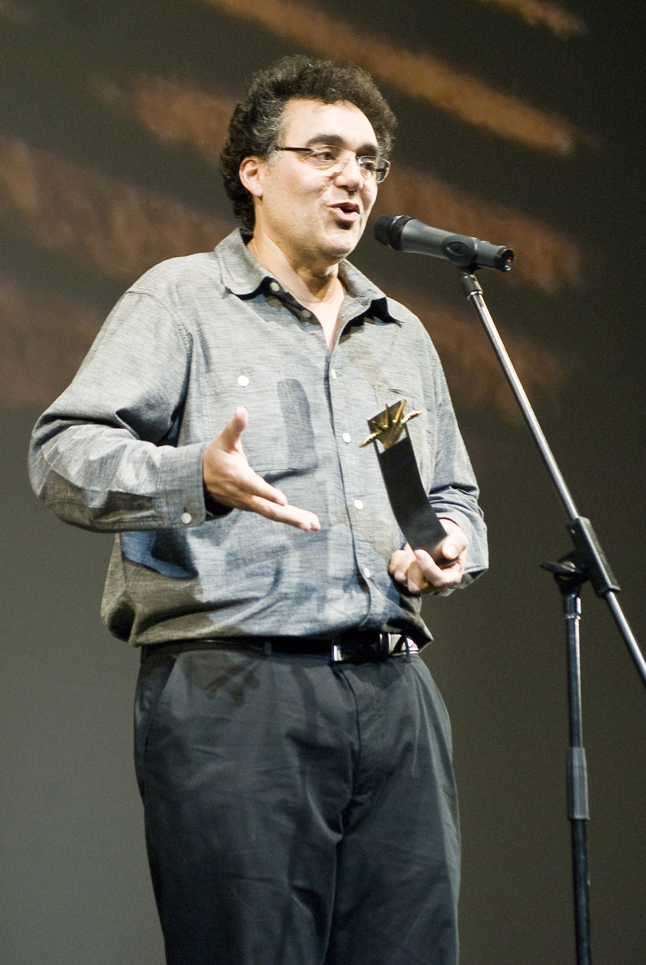 Rodrigo García Barcha, director de la película "Mother & Child", recibe el Premio Guadalajara en el marco de las actividades del Festival Internacional de Cine de Guadalajara en su edición 25. 17 de Marzo, 2010. Guadalajara, México. © Cortesía FICG25 / Gonzalo García Ramírez.